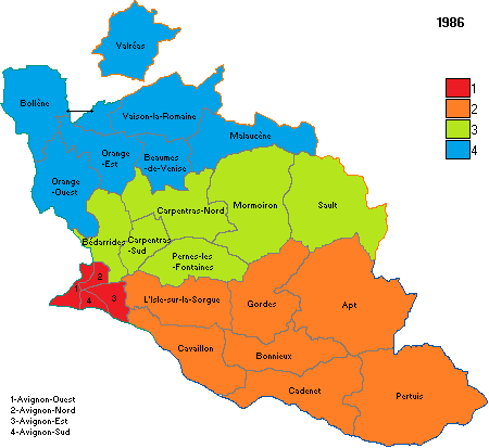 Circonscriptions du Vaucluse en 1986